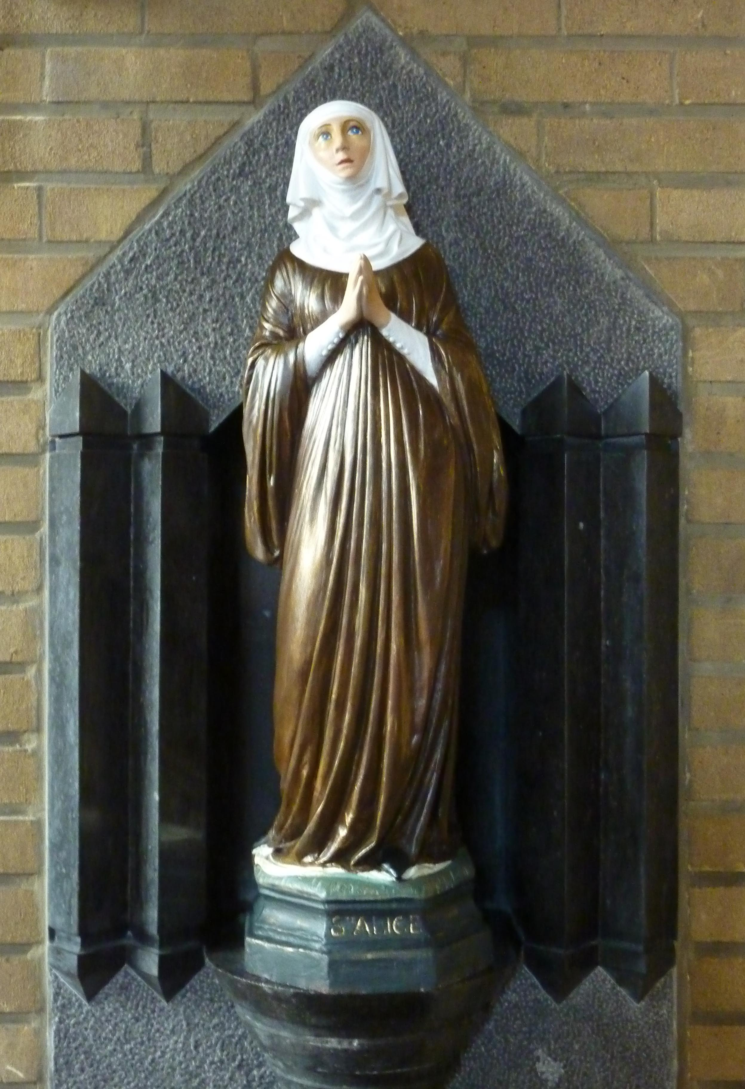 L'église Sainte-Alice à Schaerbeek, Bruxelles, Belgique.